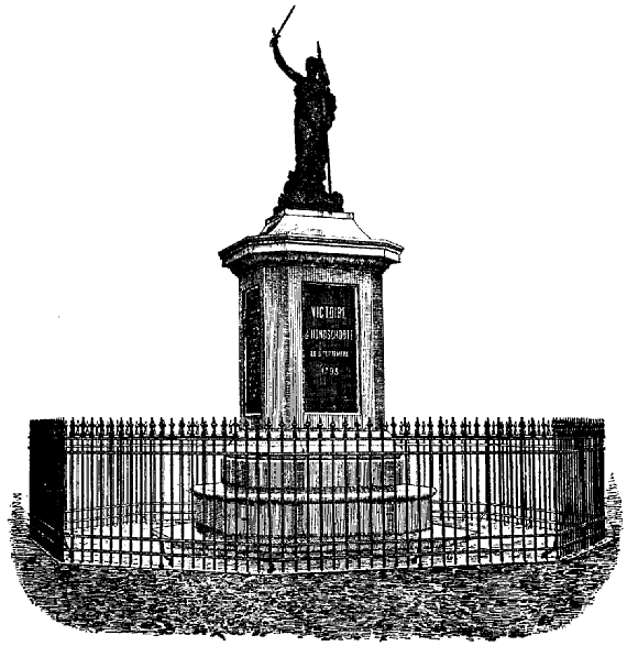 Légende originale : "Monument de la victoire d'Hondschoote, inauguré le 15 juin 1890 sur la place d'Hondschoote." Extrait du livre de Paul Foucart intitulé "La défense nationale dans le Nord, de 1792 à 1802. Tome 2" édité à Lille par impr. de Lefebvre-Ducrocq en 1890.